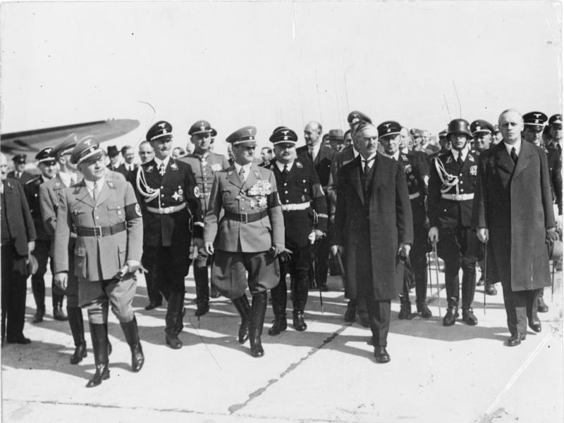 Scherl: Historische Stunden in München. Landung des englischen Premierminsters Chamberlain auf dem Münchener Flugplatz Oberwiesenfeld. Von links nach rechts: Gauleiter Adolf Wagner, Polizeigeneral Daluege, Reichsstatthalter Ritter von Epp, weiter rechts Premierminster Chamberlain, Reichsaussenminister von Ribbentrop. 12861-38, 29.9.38 II.Text ADN-ZB/Archiv Im faschisitischen Deutschland 1933-45 Münchener Abkommen , September 1938 Nach der Landung des englischen Premierministers Neville Chamberlain auf dem Münchner Flughafen Oberwiesenfeld am 29.9. 1.R.V.l. Gauleiter Adolf Wagner, General der Polizei Kurt Daluege, Reichsstatthalter Ritter von Epp, Chamberlain und der deutsche Außenminister von Ribbentrop. 12861-38